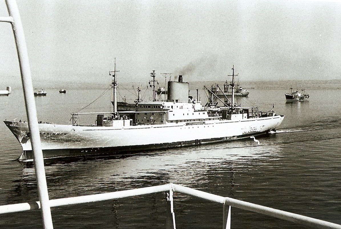 Das Kühlschiff Persimmon auf Reede vor dem Shatt al-Arab Sommer 1975.